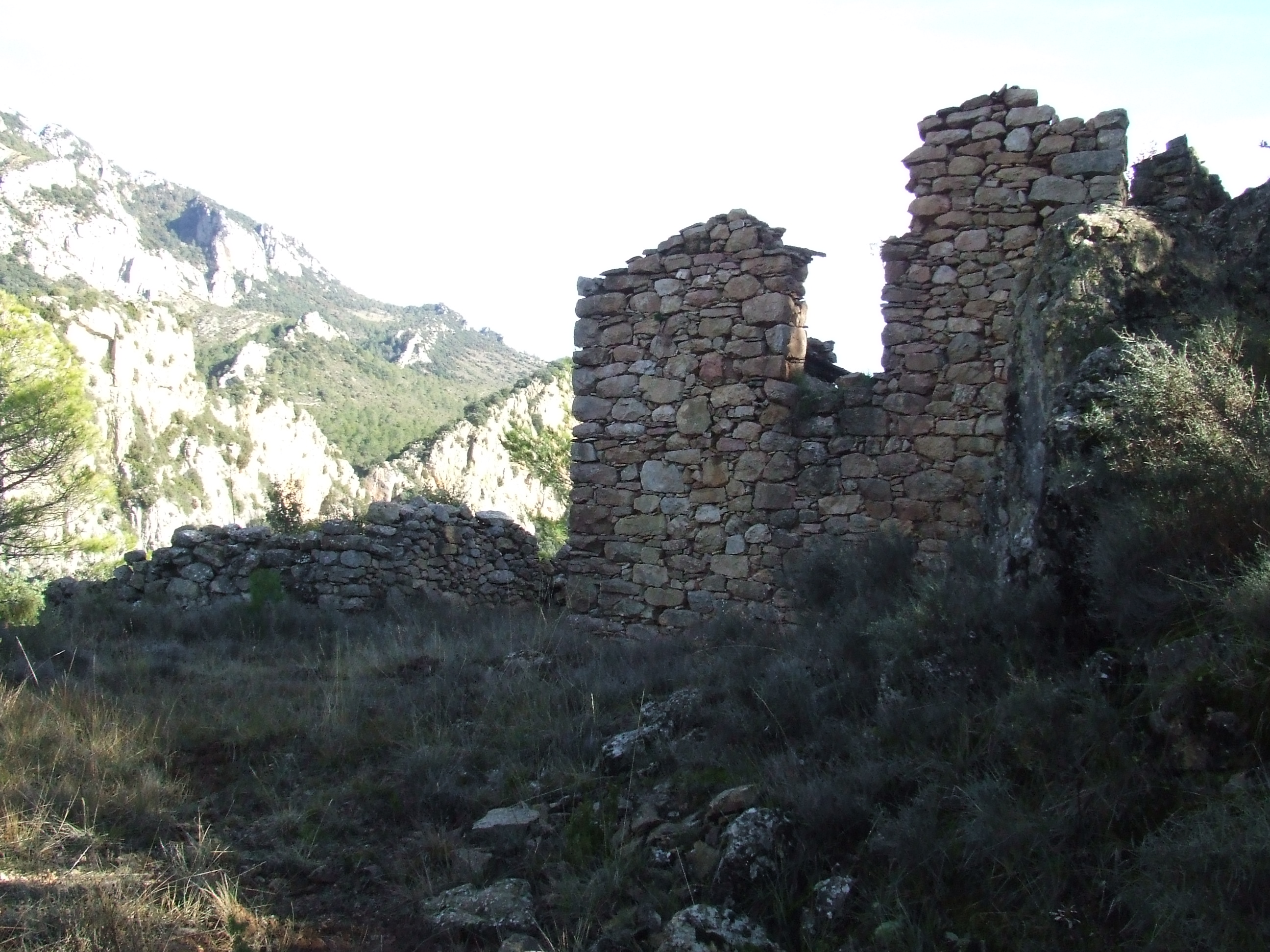 La Borda del Zidro (Abella de la Conca, Pallars Jussà)